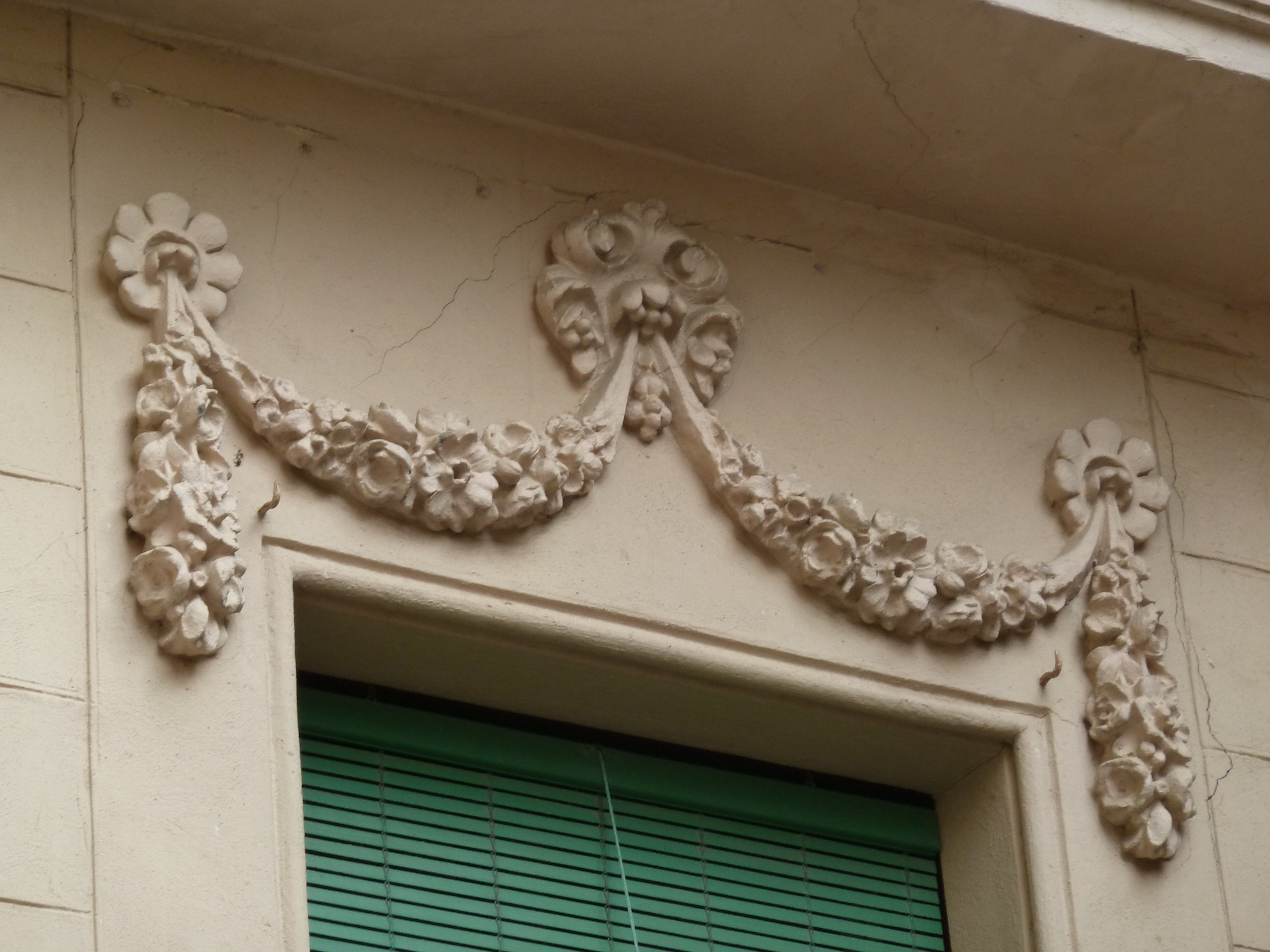 Balaguer